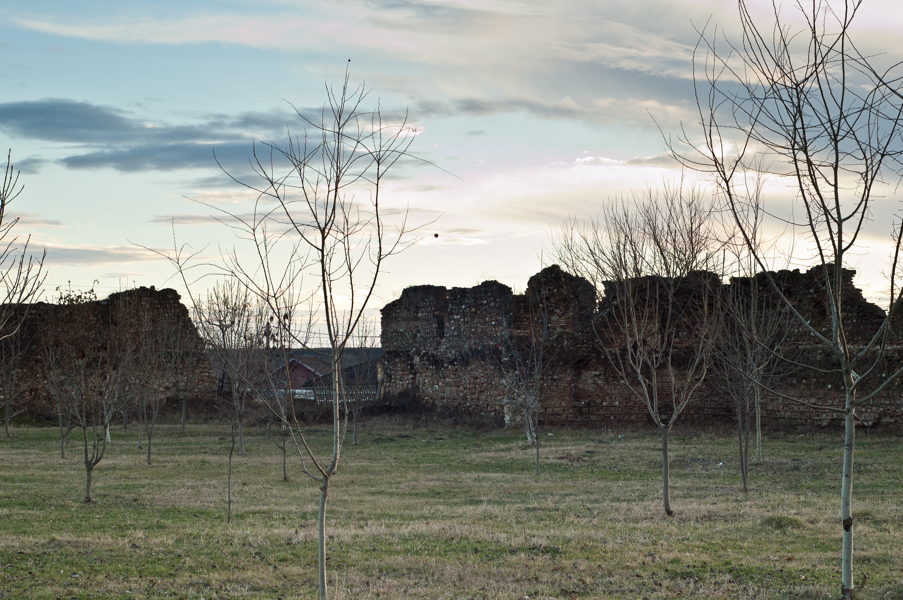 ce a mai ramas din zidurile curtii domnesti din doicesti